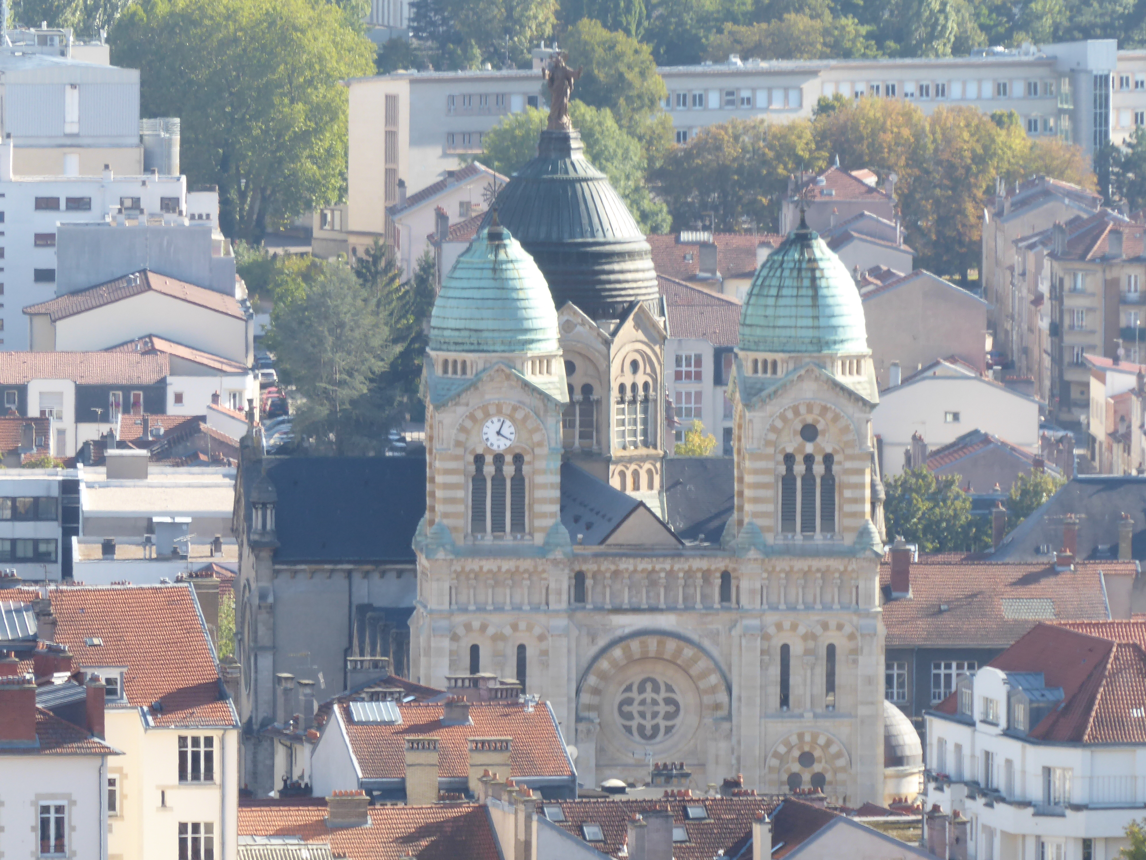 Basilique du Sacré-Cœur à Nancy, vue depuis le parc de la Cure d'air.